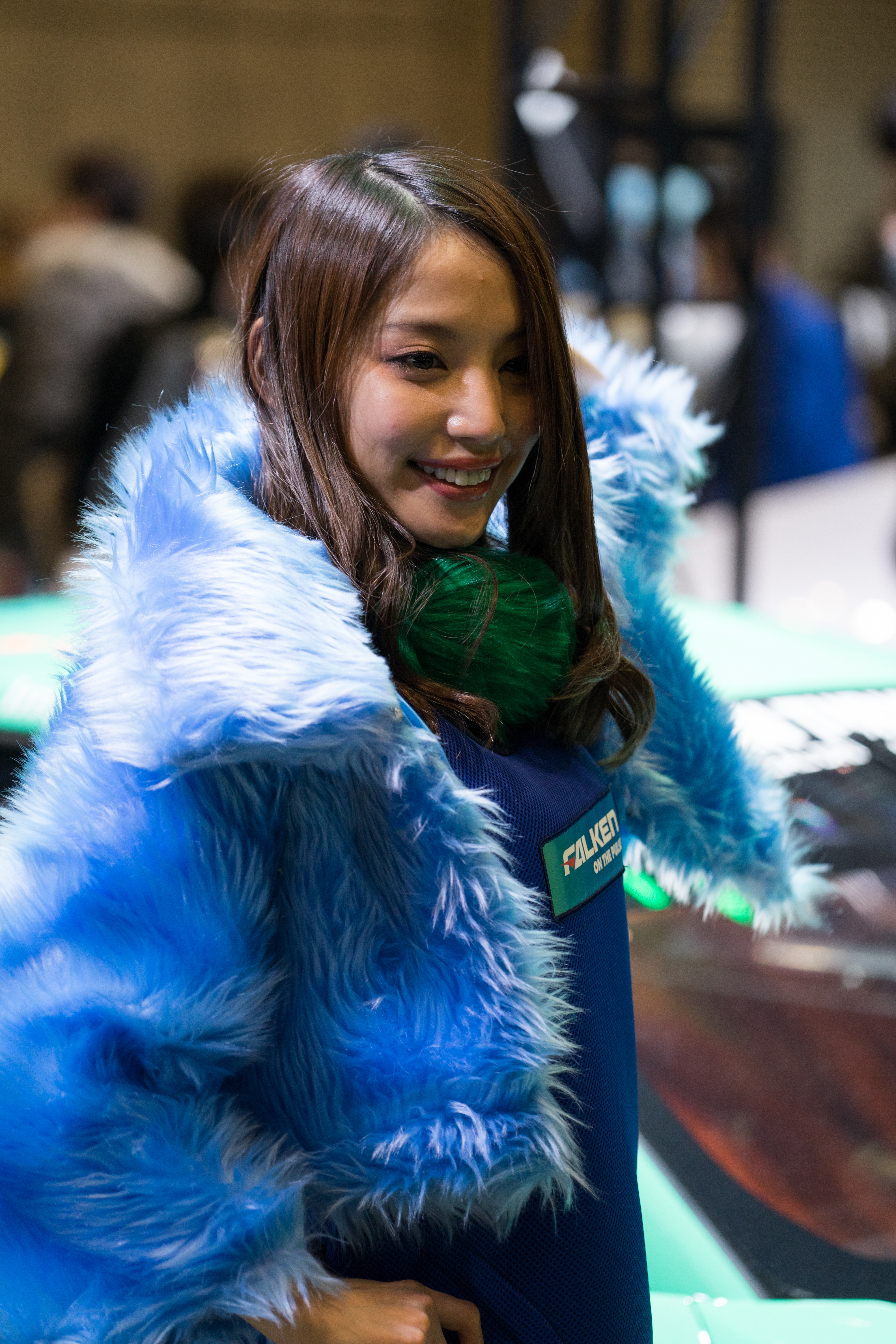 TOKYO AUTO SALON 2017 （東京オートサロン2017）-227.jpg